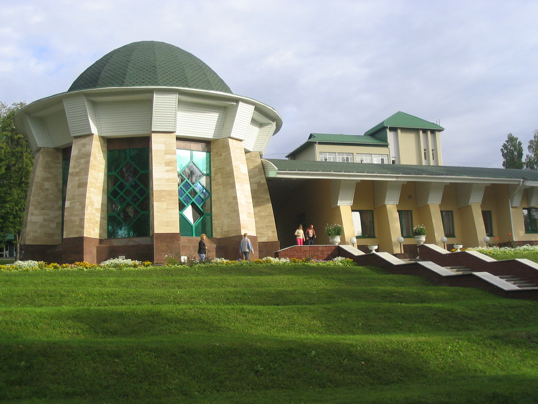 Санаторий Янган-Тау, Башкортостан. Россия.